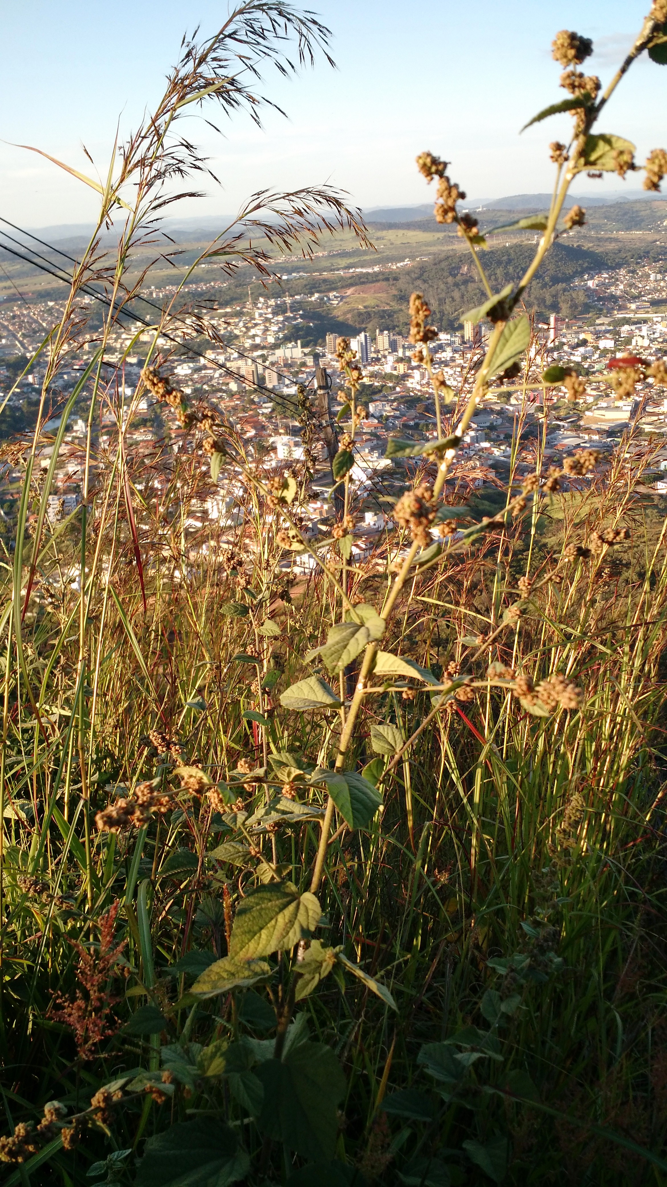 Relevo da cidade montanhoso observado da Serra das Torres a uma altitude de 1200 metros.